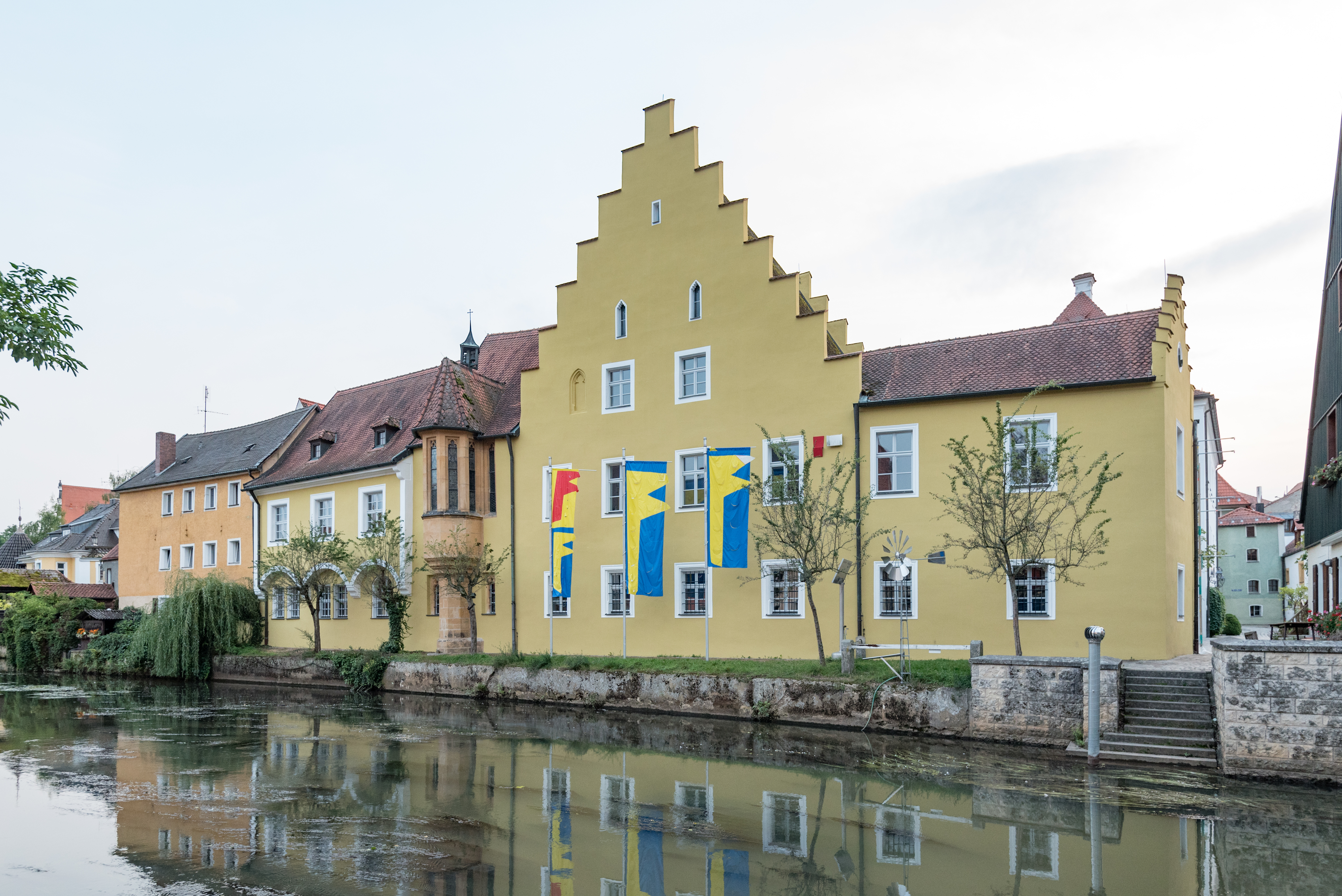 Amberg, Eichenforstgäßchen 12